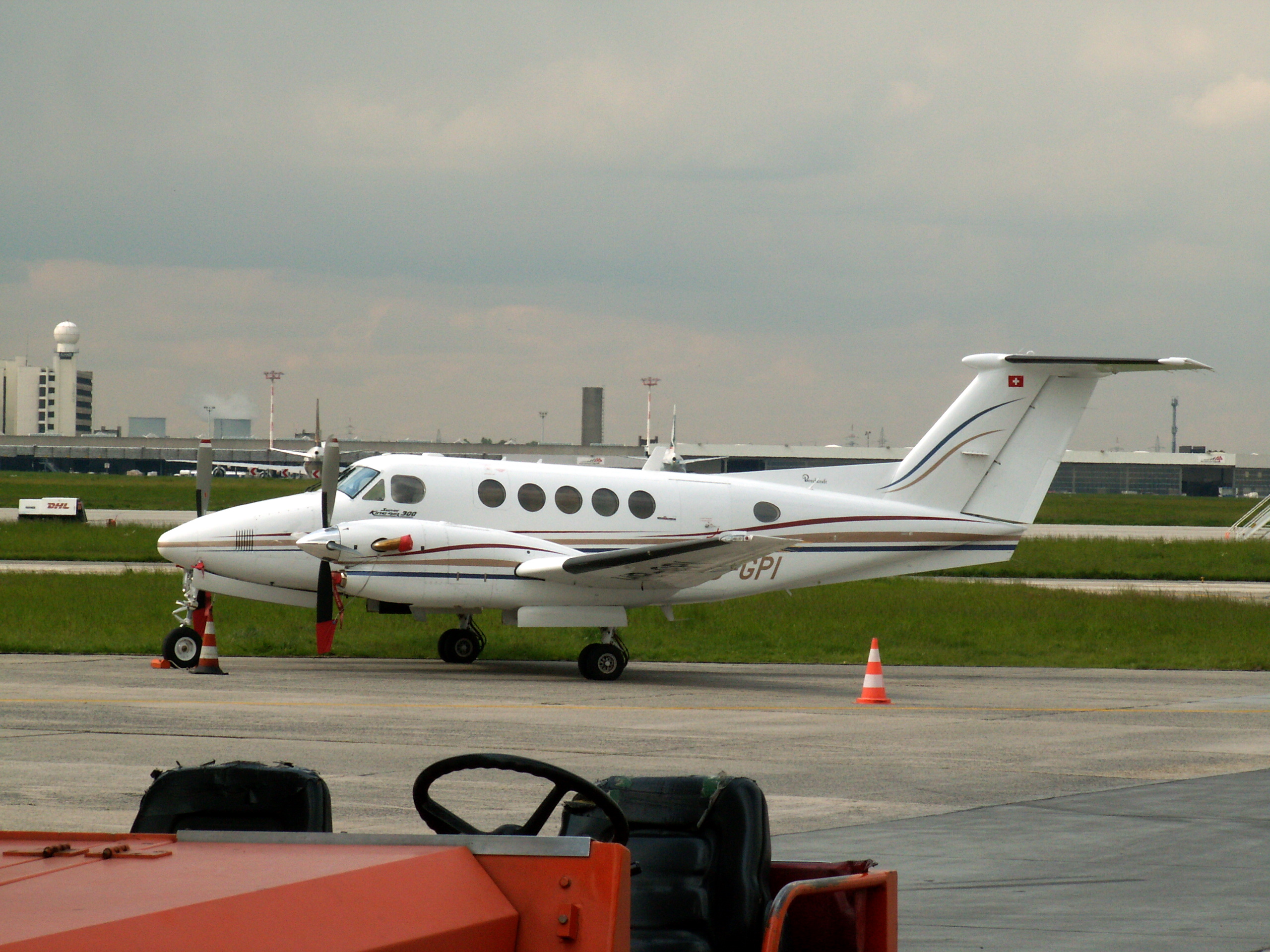 HB-GPI Technomag AG Beech 300 Super King Air, Leipzig Halle (LEJ - EDDP)